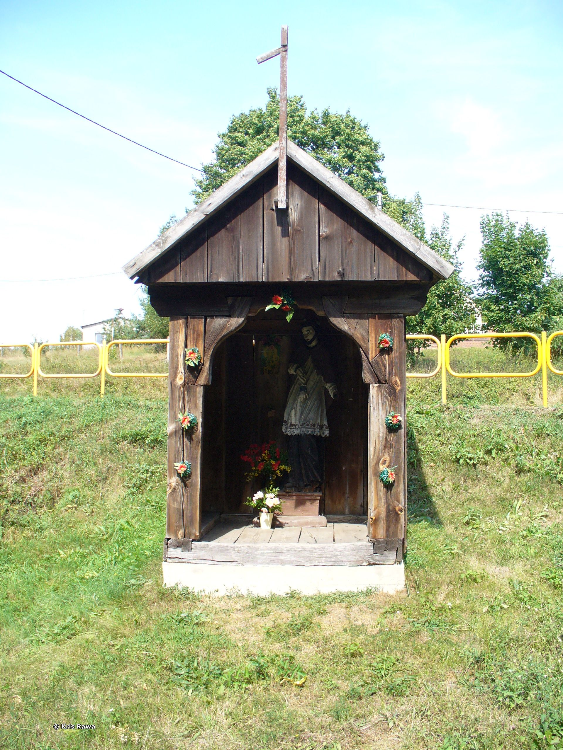 Kapliczka św. Jana Nepomucena w Belnie z drugiej połowy XIX wieku. Budowla jest drewniana, kryta gontem. W środku 1,5 metrowa barokowa figurka świętego. Postaci brakuje połowy lewej reki. Kaplica z figurą znajduje się po prawej stronie DK 74 Kielce - Lublin